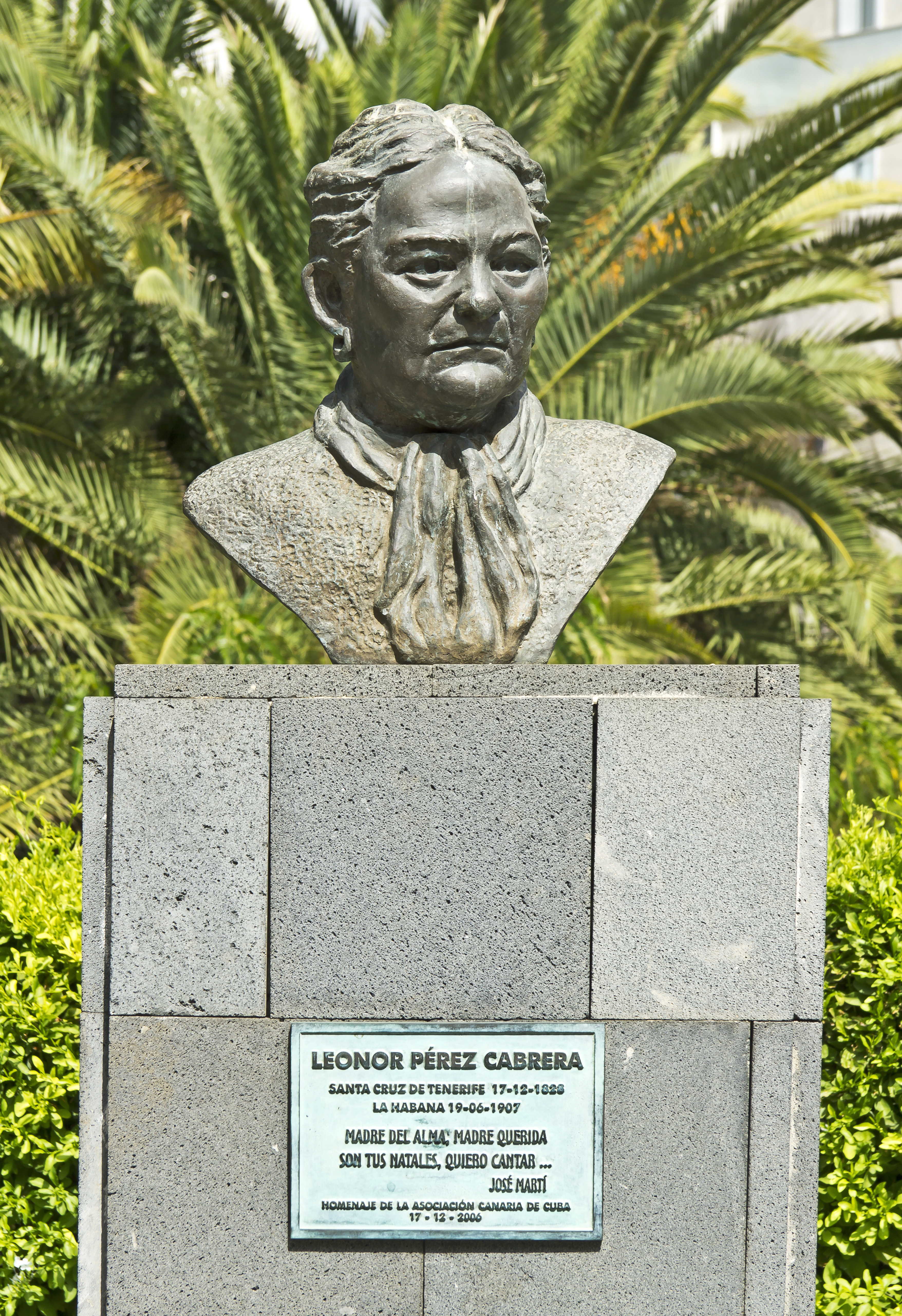 Leonor Pérez Cabrera, geboren am 17. Dezember 1828 in Santa Cruz de Tenerife, gestorben am 19. Juni 1907 in Havanna (Kuba), war Mutter des kubanischen Nationalhelden José Martí. Ihre Büste steht im Parque García Sanabria in Santa Cruz de Tenerife.